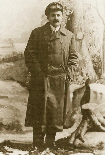 Mr Erik Gustaf Lindeberg-Lind porträtt